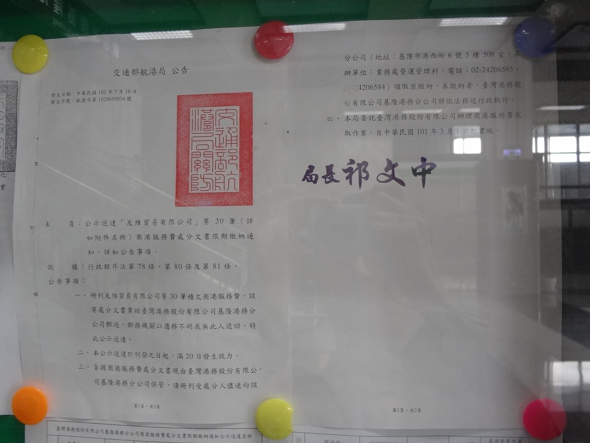 基港大樓一樓公布欄張貼的交通部航港局2013年7月10日公告。